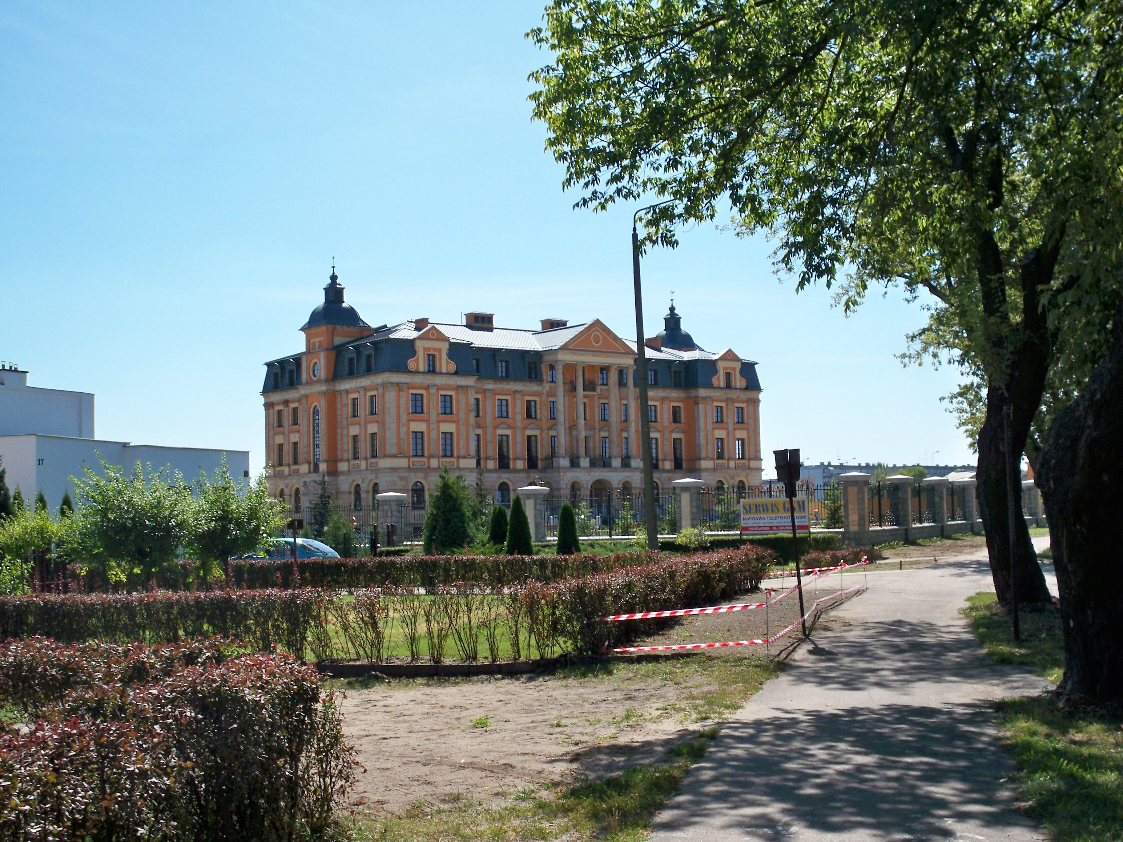 Pałac Bursztynowy (2009 r.)